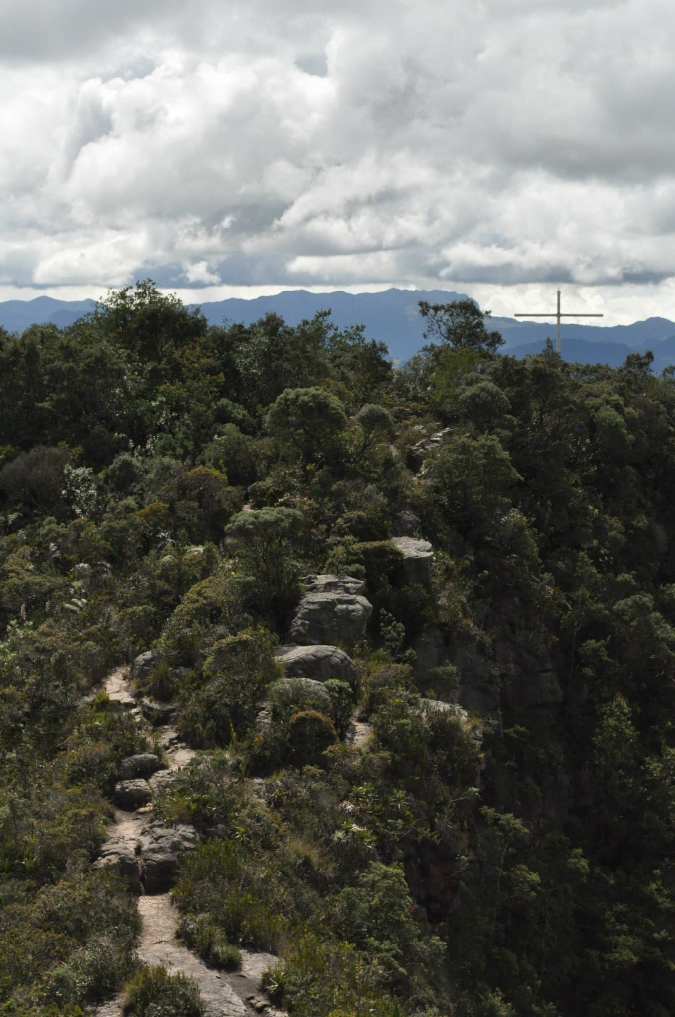 Sendero a la Cruz de Pio nono